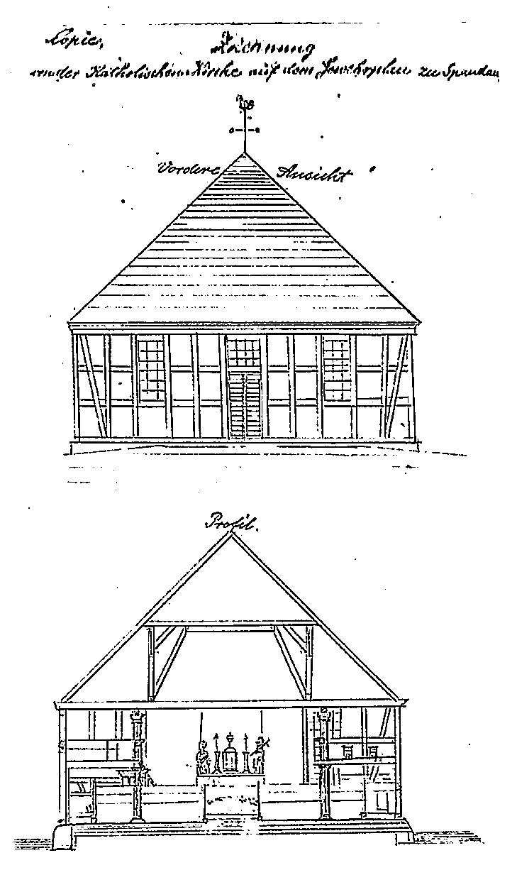 Skizze der katholischen Kirche auf dem Gewehrplan, Berlin-Spandau (1766/67-1849) Quelle: Pfarrarchiv St. Maria - Hilfe der Christen, Berlin-Spandau; abgedruckt in: Helmut Kißner, Cordia Schlegelmilch: Die Kirche St. Marien am Behnitz in Spandau. Ein vergessenes Werk August Sollers. Berlin 2004, S. 26.